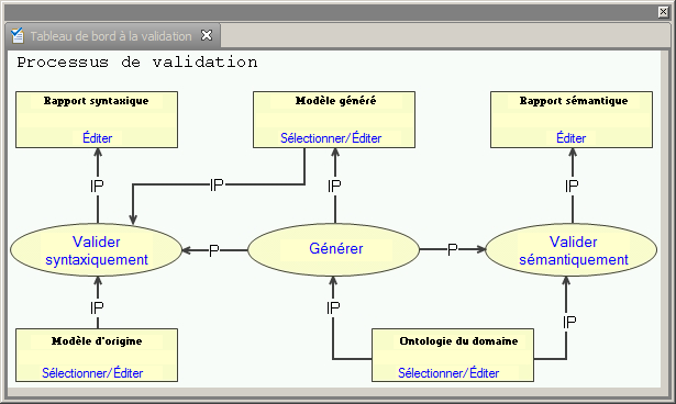 Interface OntoVAL